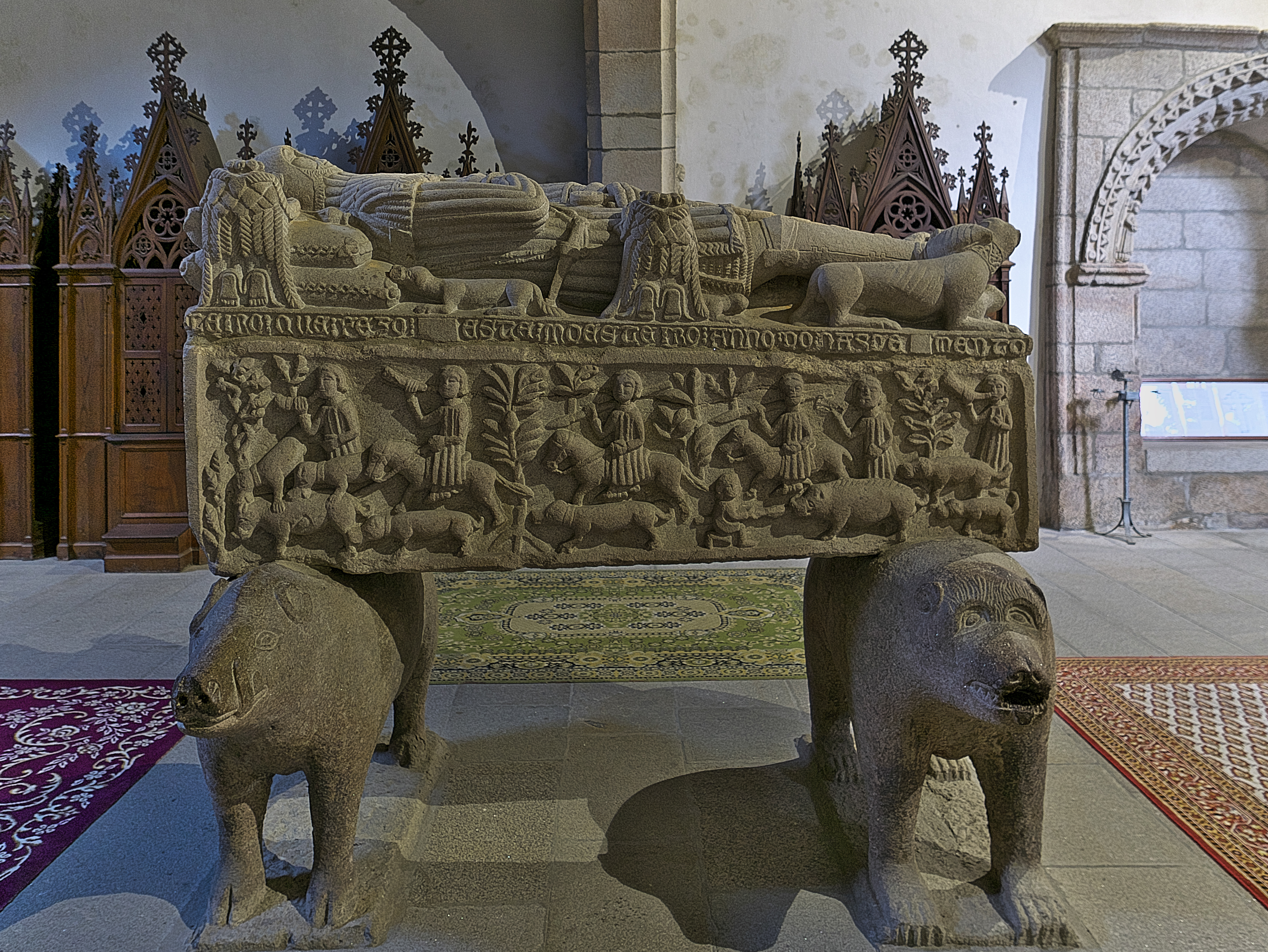 Iglesia de San Francisco (Betanzos). Sepulcro de granito sobre los lomos de un jabalí y de un oso. Procede del presbiterio de esta iglesia patrocinada (1387) por Fernán Pérez de Andrade (†1397), señor de la Casa de Andrade, de Ferrol, de Neda, de Cedeira, de Puentedeume, de Santa Marta, de Villalba, de Viveiro, de Naraío.